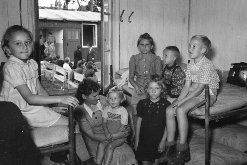 Durchgangslager Giessen Kein seltener Anblick: Familien mit fünf oder mehr Kindern wagen den Sprung aus der Sowjetzone.